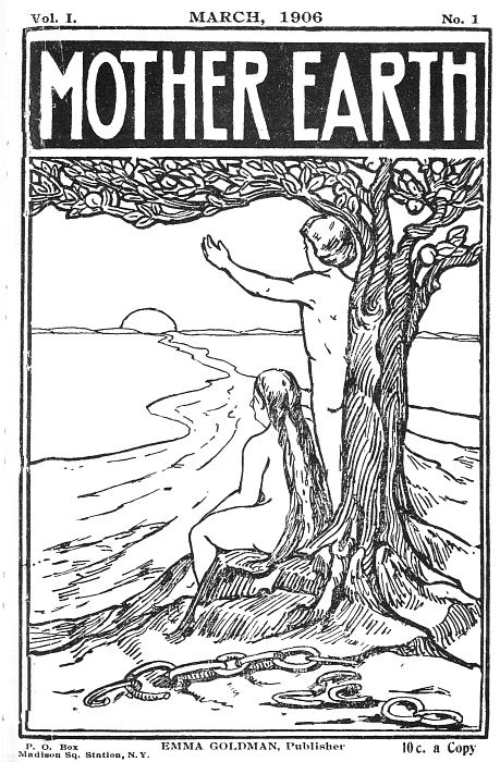 Mother Earth est un journal anarchiste se présentant lui-même comme un « mensuel dédié aux sciences sociales et à la littérature » et édité par Emma Goldman. Alexandre Berkman est également éditeur de 1907 à 1915.